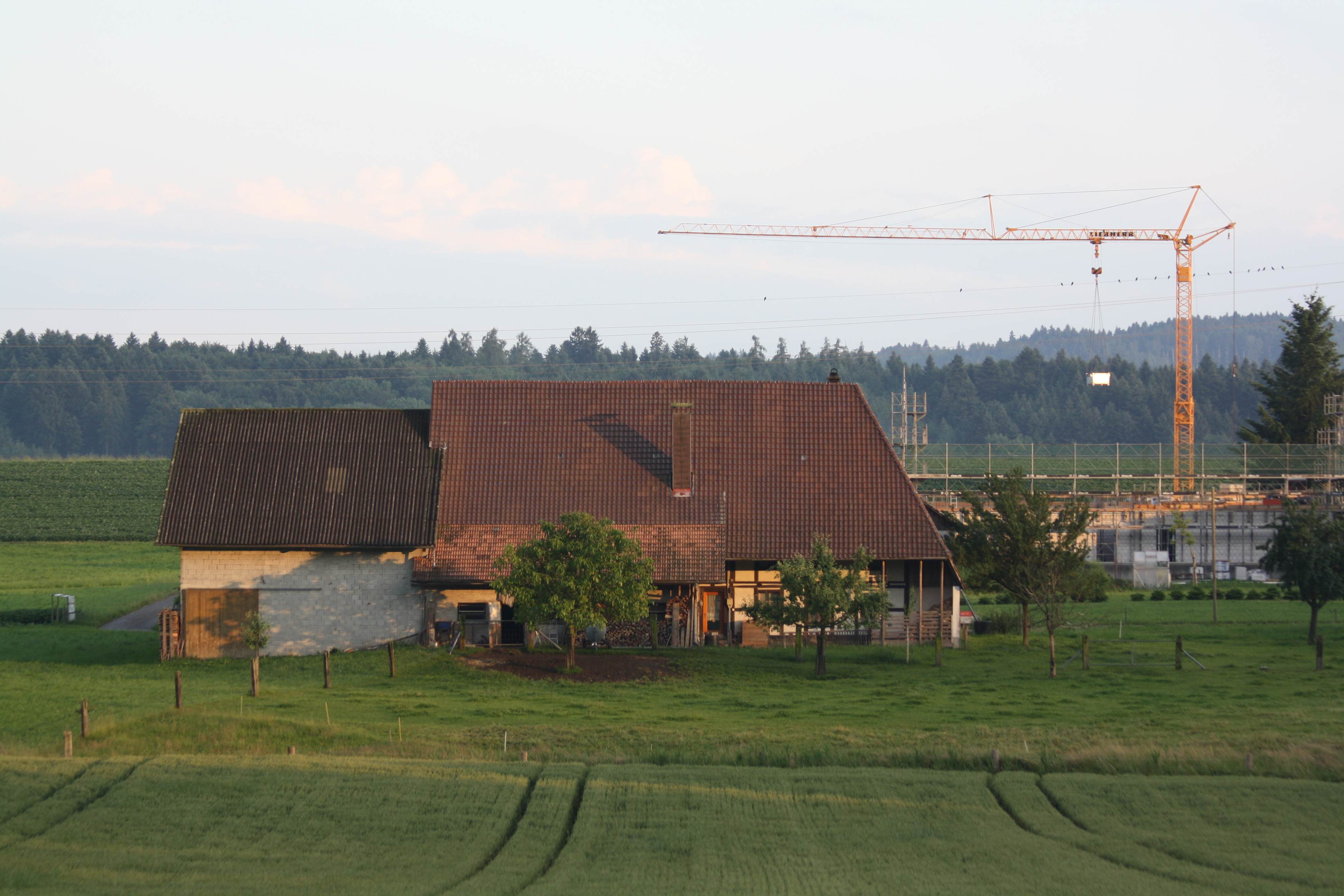 Bauernhaus in Grossaffoltern